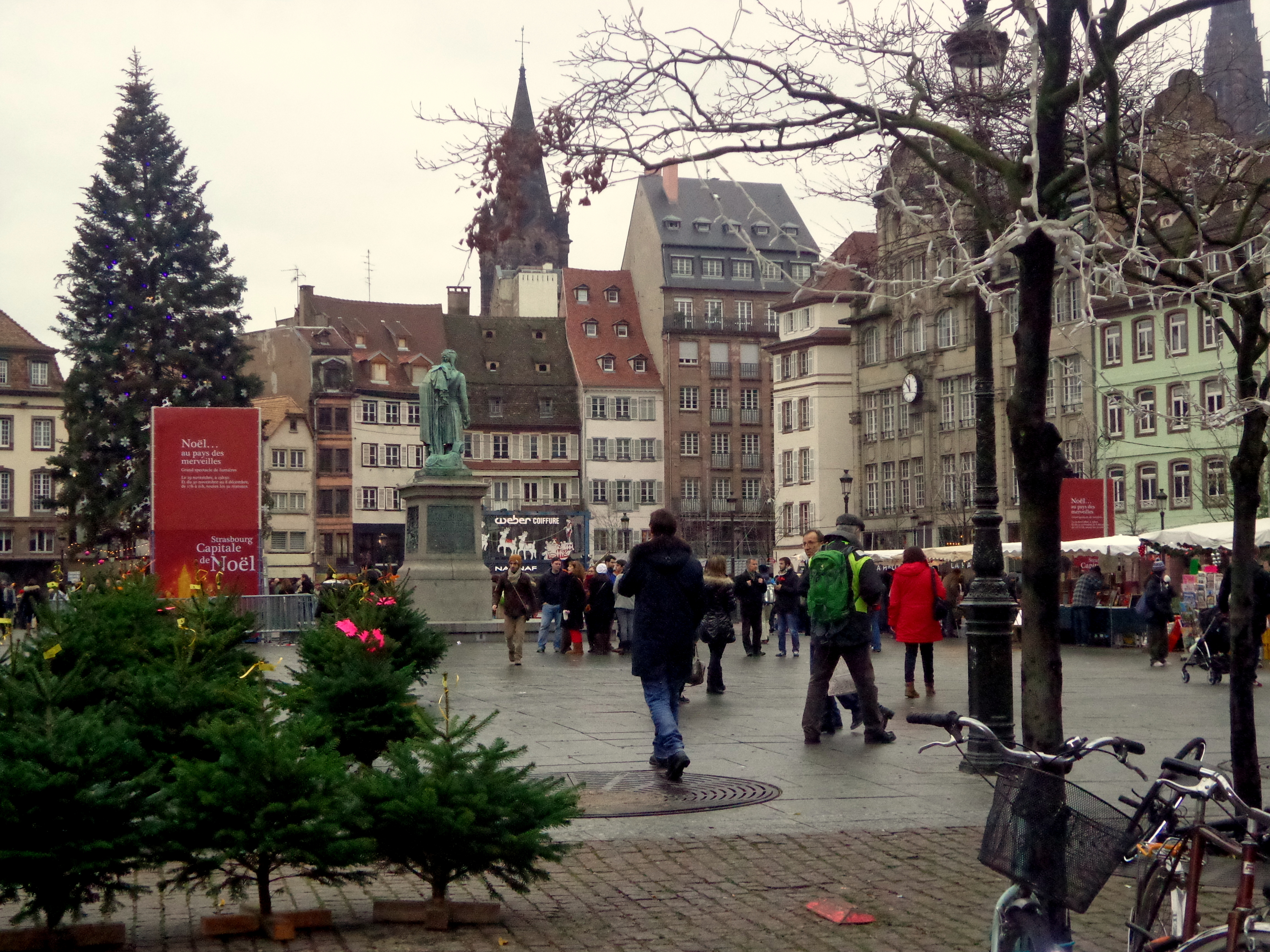 La place Kléber à Strasbourg